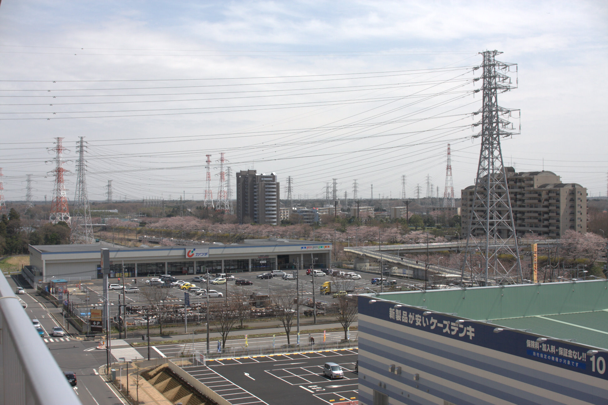 カワチ薬品白井店。手前はケーズデンキ白井駅前店